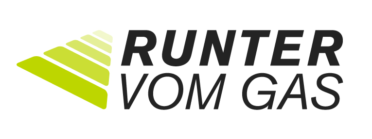 Kampagnen-Logo